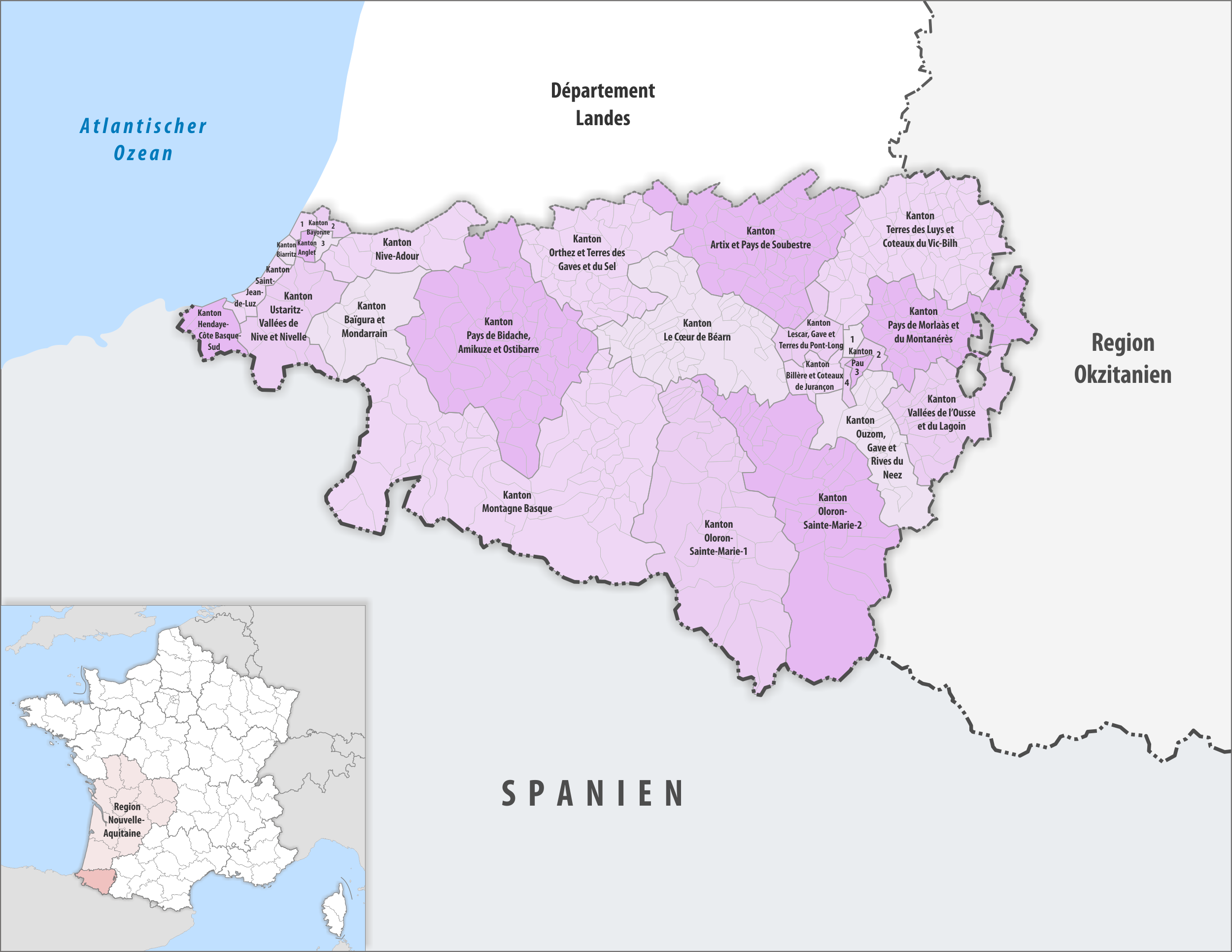 Gemeinden und Kantone im Departement Pyrénées-Atlantiques